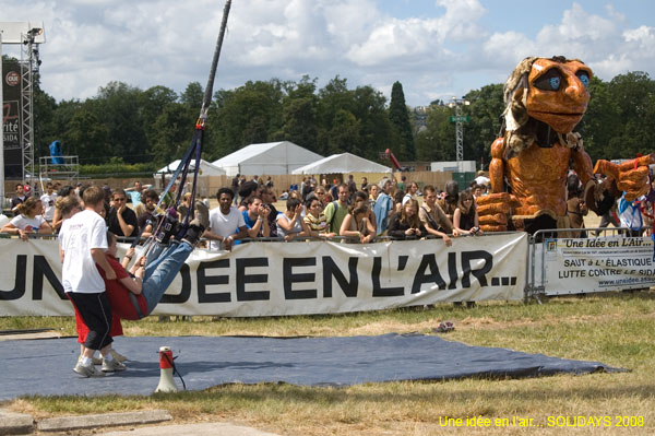 Saut à l'élastique aux SOLIDAYS avec "Une idée en L'air"